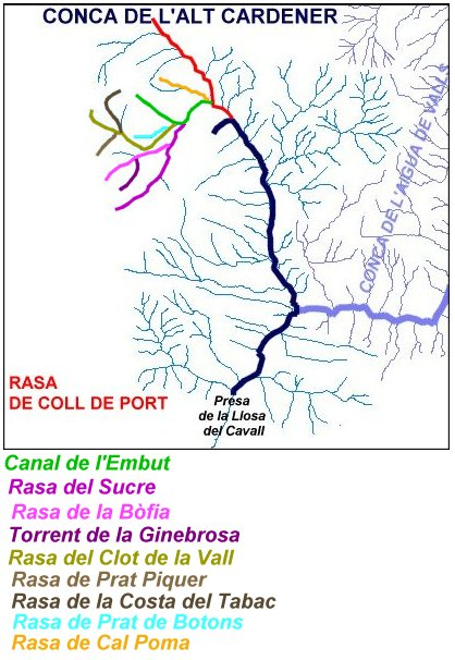 Mapa de la conca alta del Cardener (Vall de Lord, Solsonès) en el qual hi apareixen destacades la Rasa de Coll de Port, la Rasa de la Bòfia, el Torrent de la Ginebrosa, la Rasa del Sucre, la Rasa del Clot de la Vall i la Canal de l'Embut